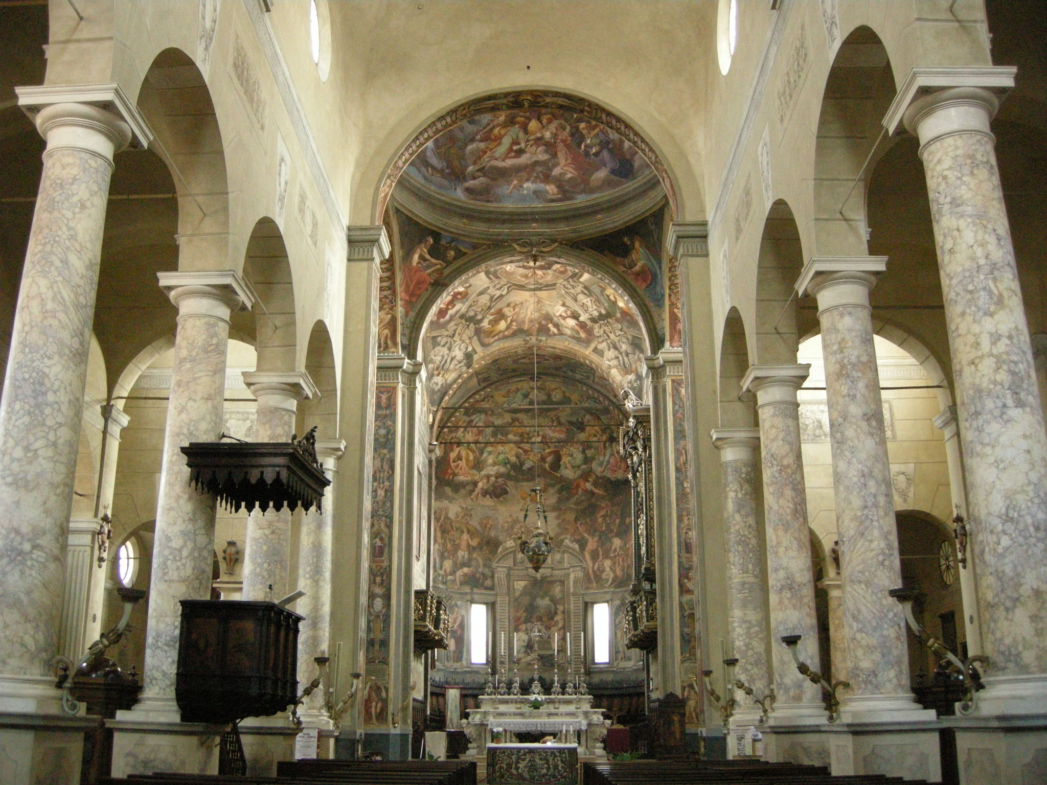 San Prospero (Reggio Emilia), interno